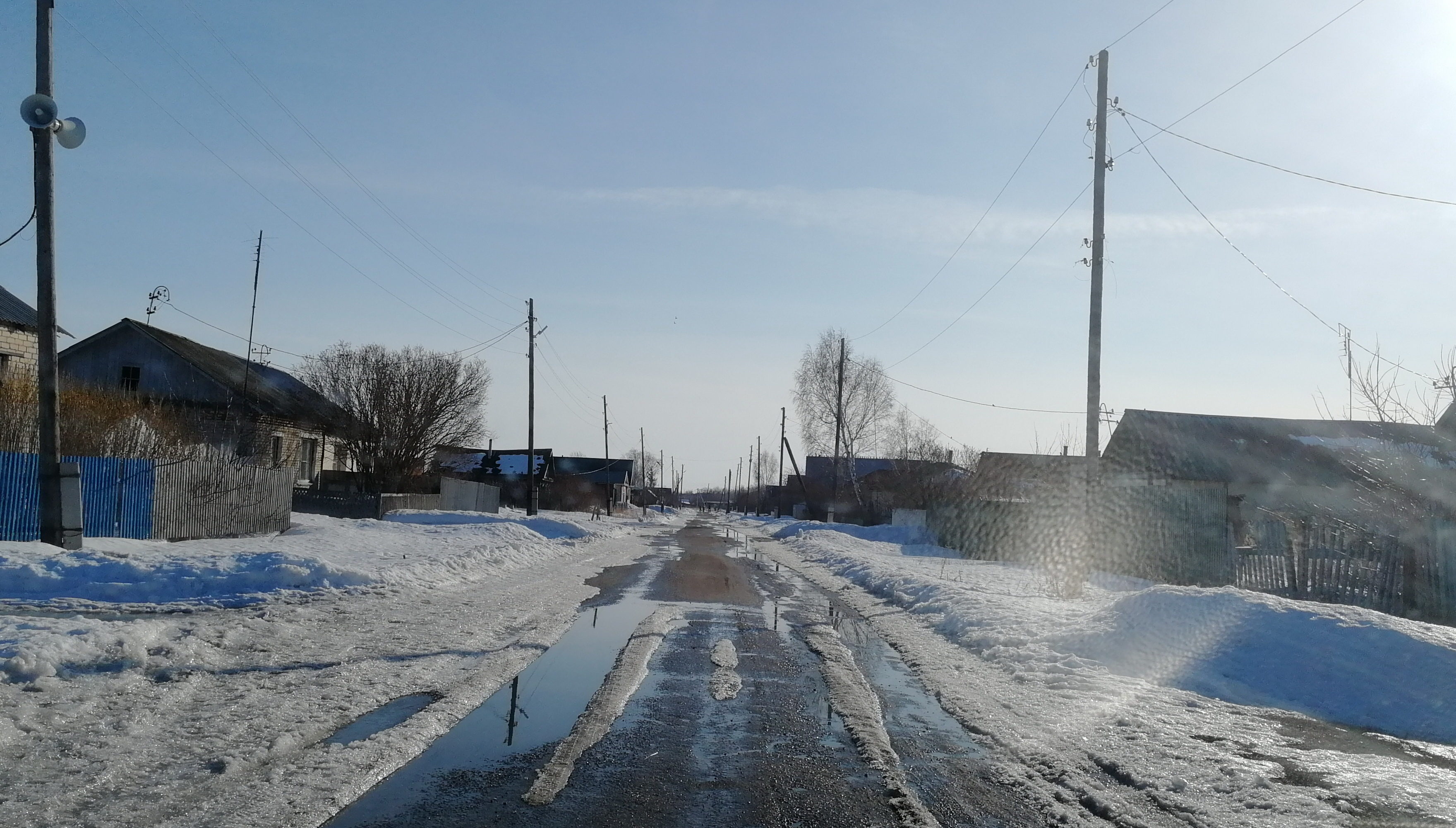 Кадымцево_улица